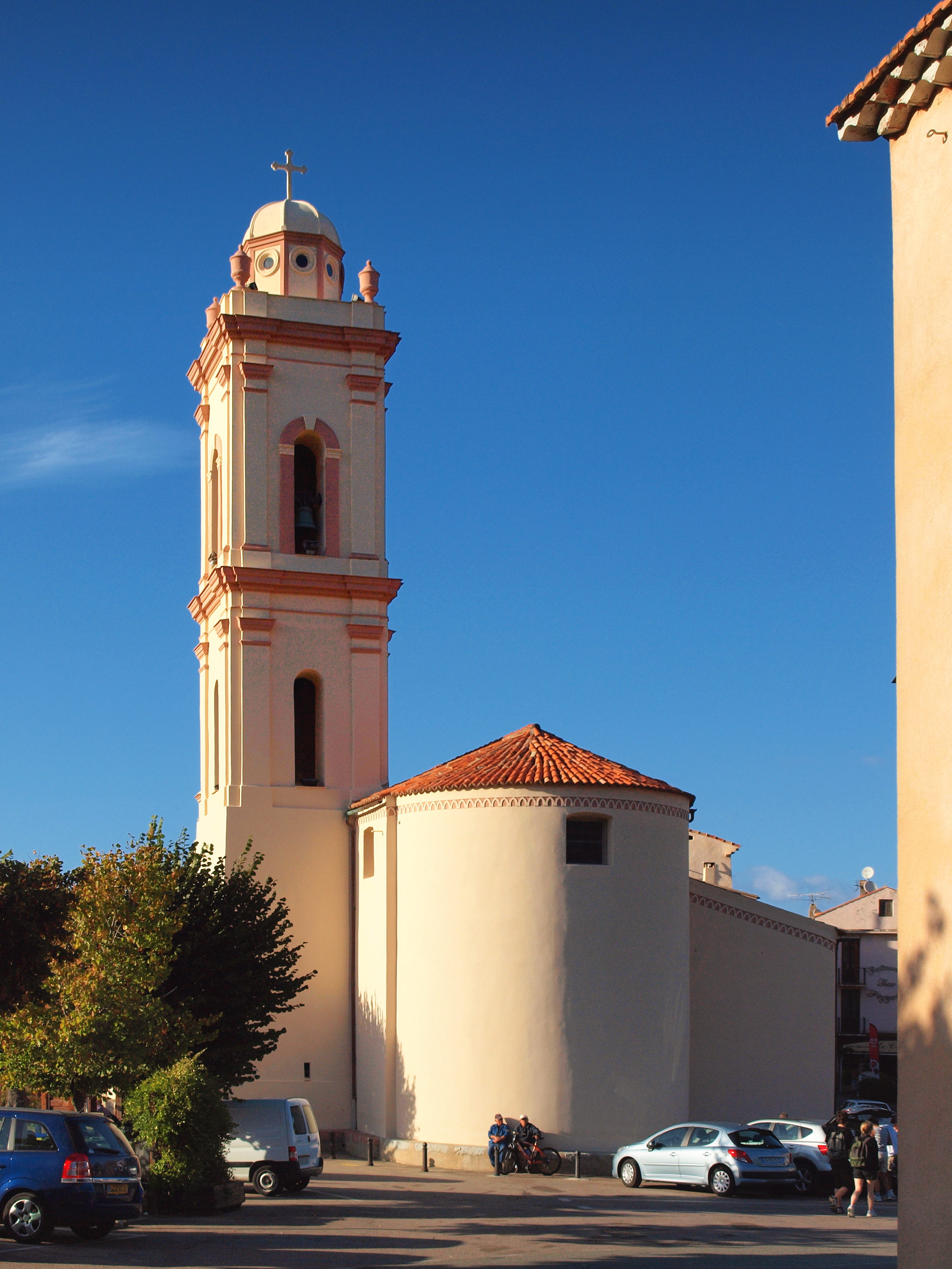 Piana (Corsica) - Église de l'Assomption